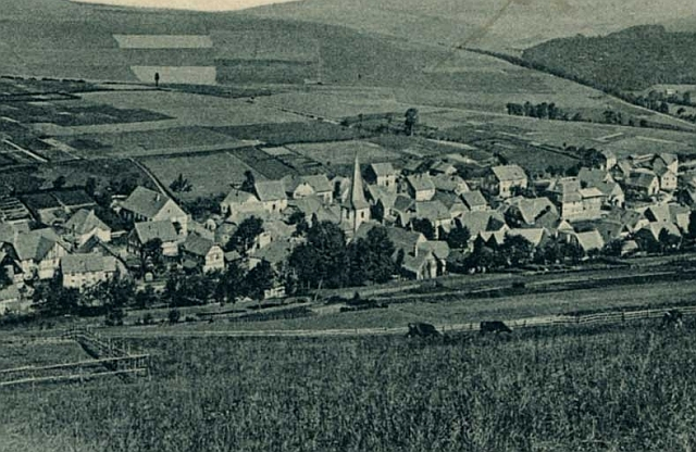 Bödefeld im Sauerland (Germany/NRW), Anno 1905